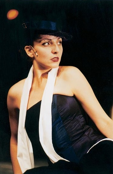 מיכל ויינברג בהצגה אופרה בגרוש, תיאטרון גשר